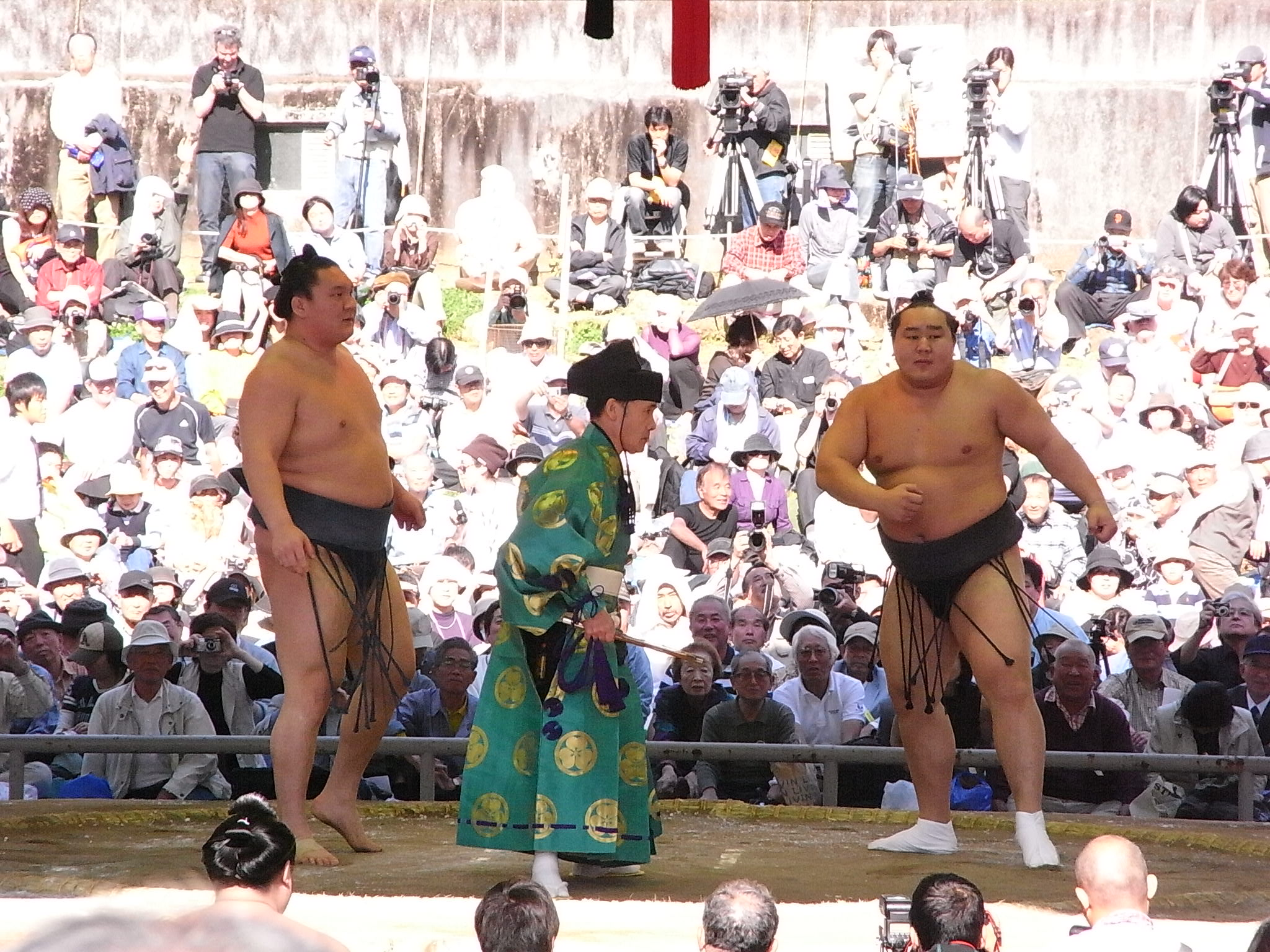 朝青龍明徳